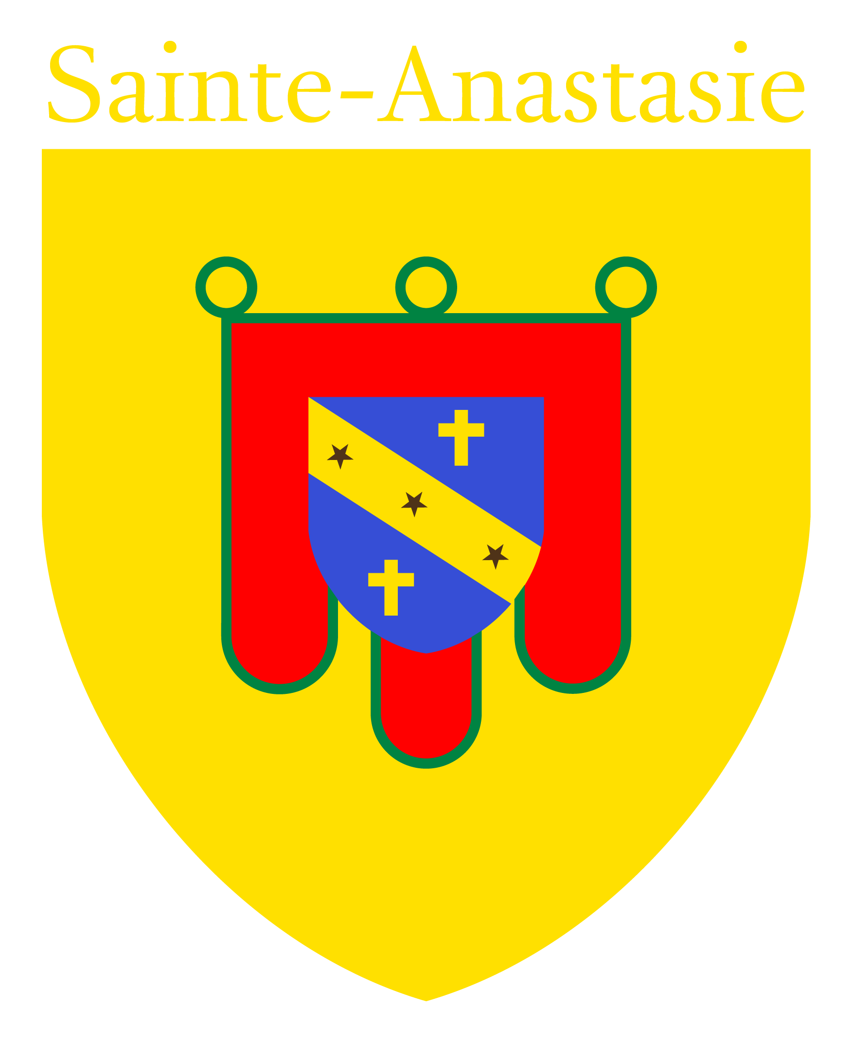 Blason de la Commune de Sainte-Anastasie en Auvergne (France)